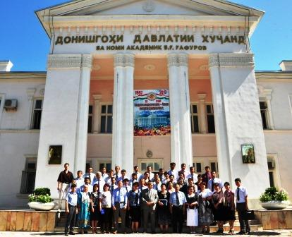 Здание администрации ХГУ им. Б. Гафурова (Худжандский госуниверситет им. академика Б Гафурова, 2013 год, Таджикистан)